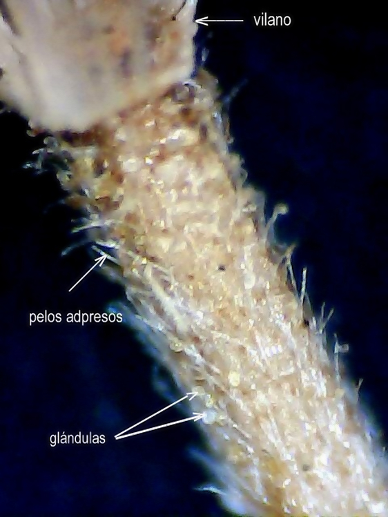 Dittrichia viscosa (Olivarda) - Cipsela suelta peluda con glándulas visibles - Paseo de Parra, Águilas (Provincia de Murcia, España).